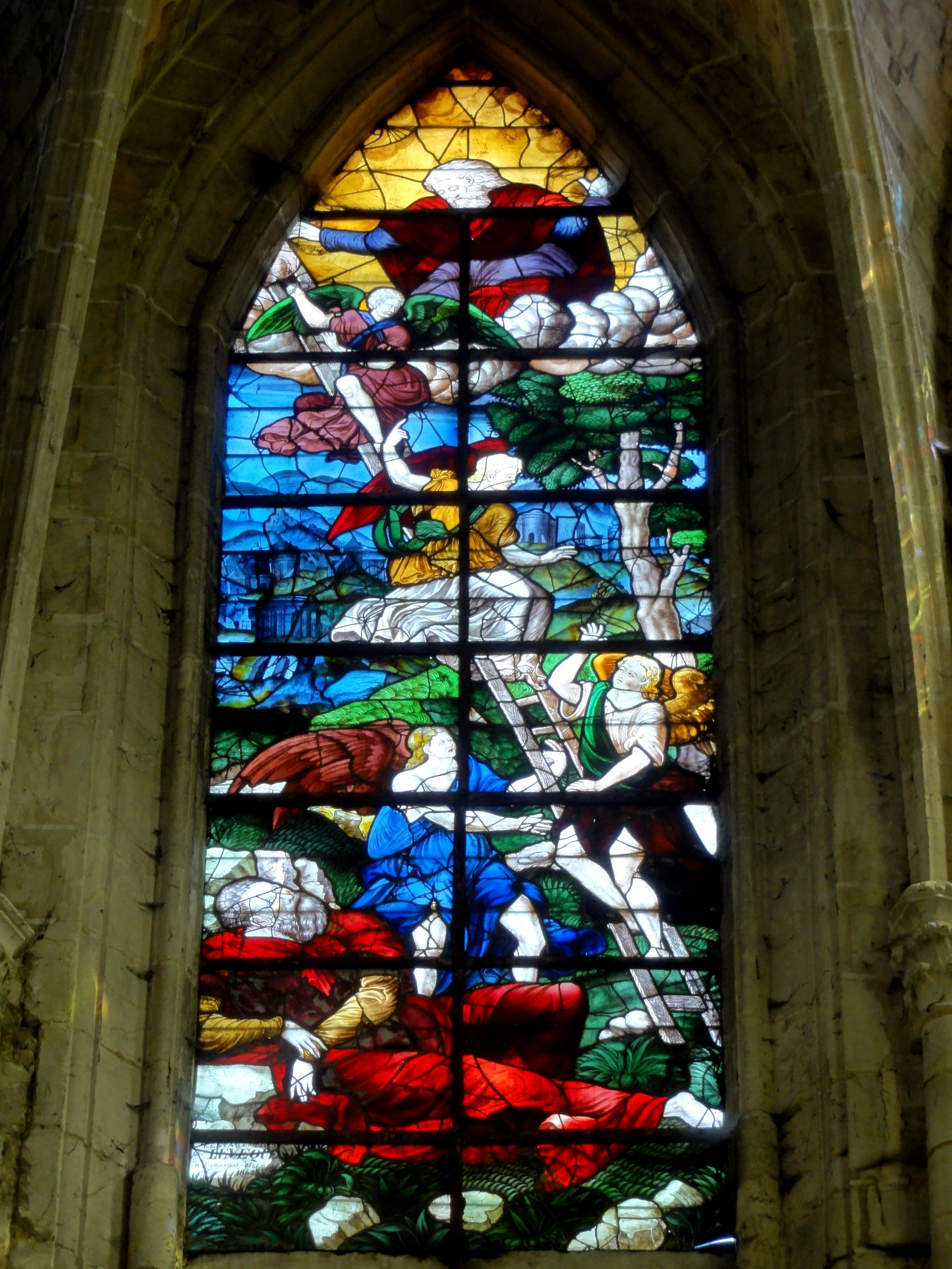 Vitrail n° 100 - songe de Jacob (rest. 1862).